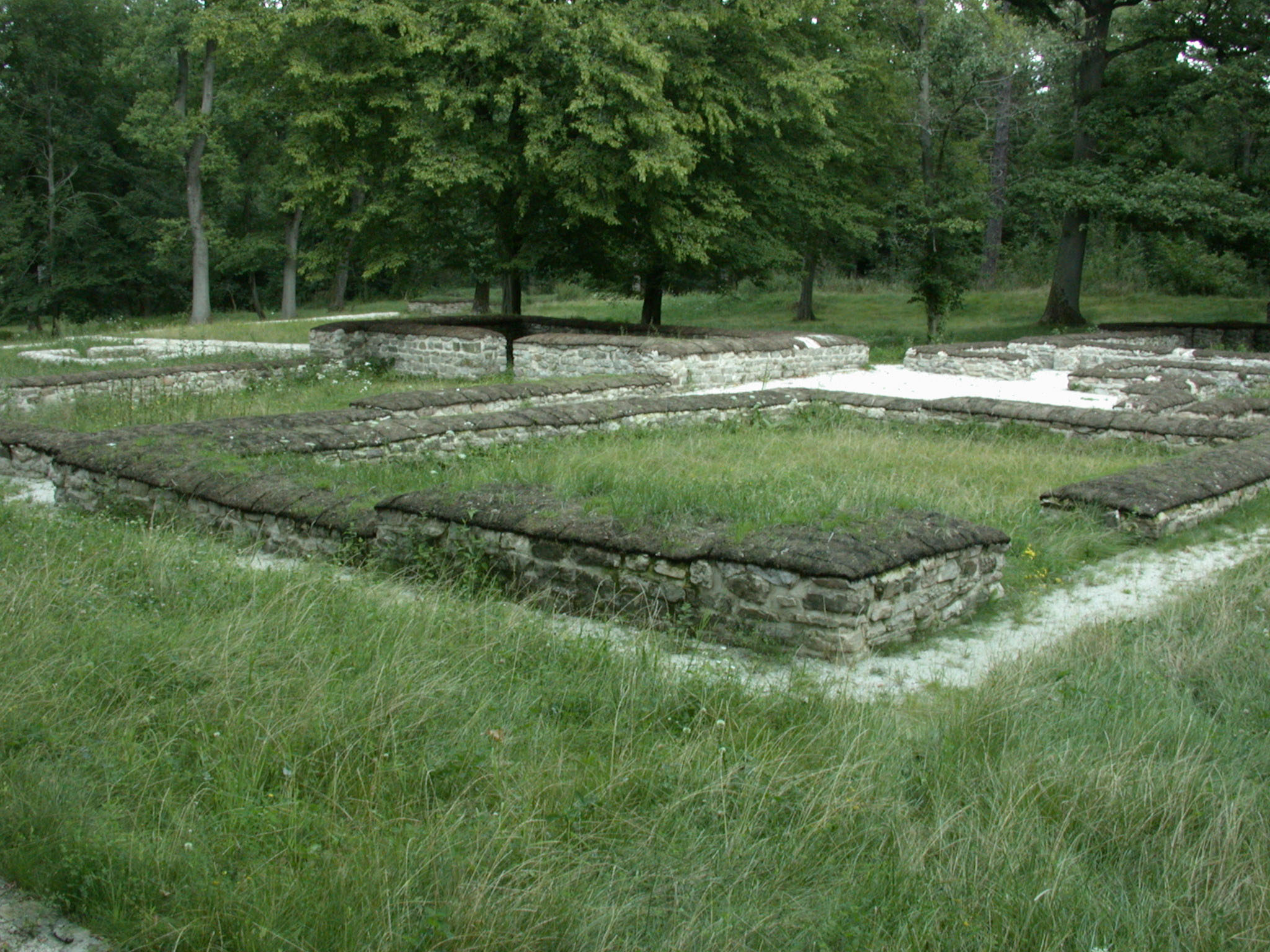 Getreidelager Limeskastell Kapersburg, Wehrheim-Pfaffenwiesbach, Deutschland